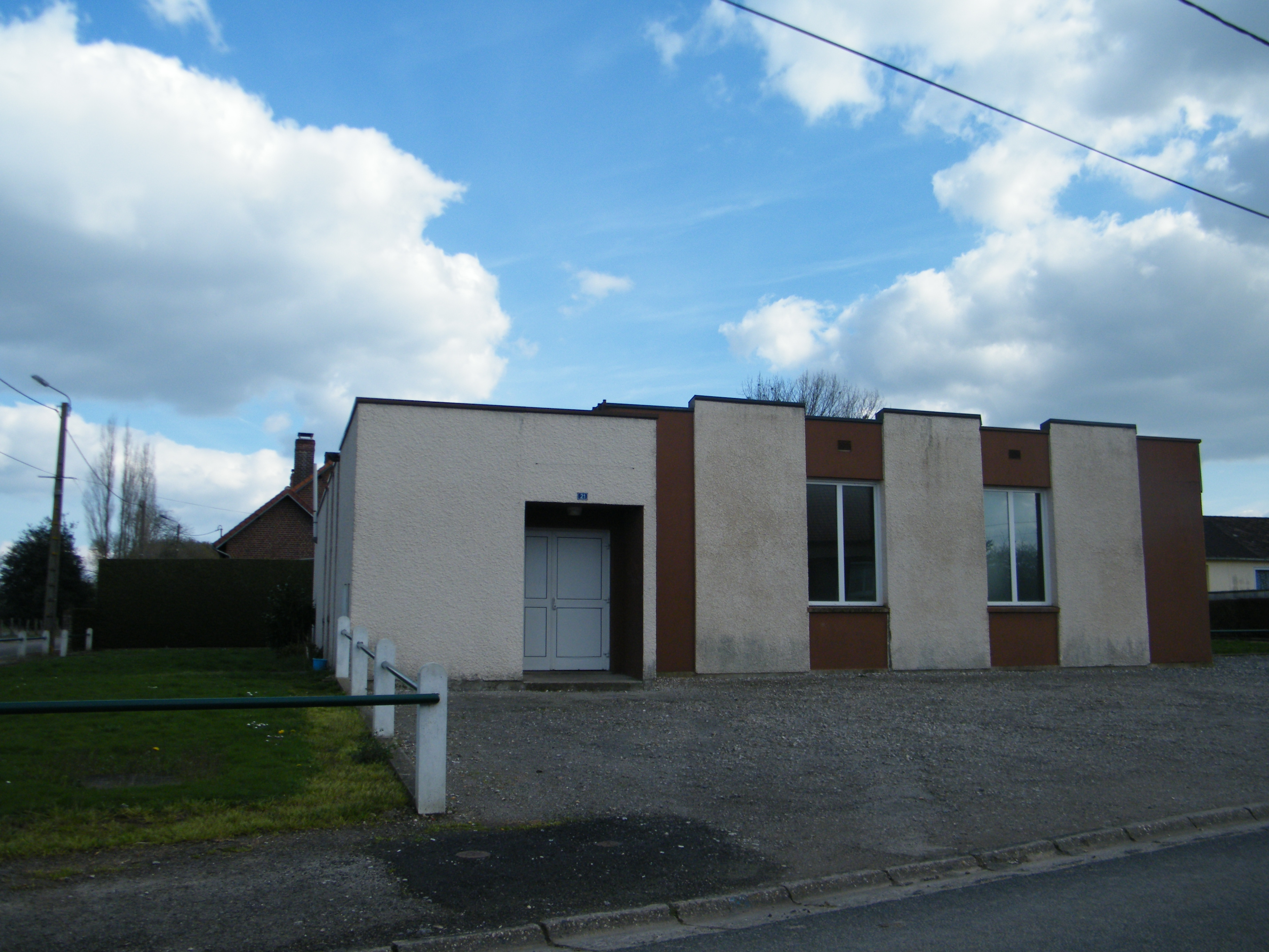 La salle communale.